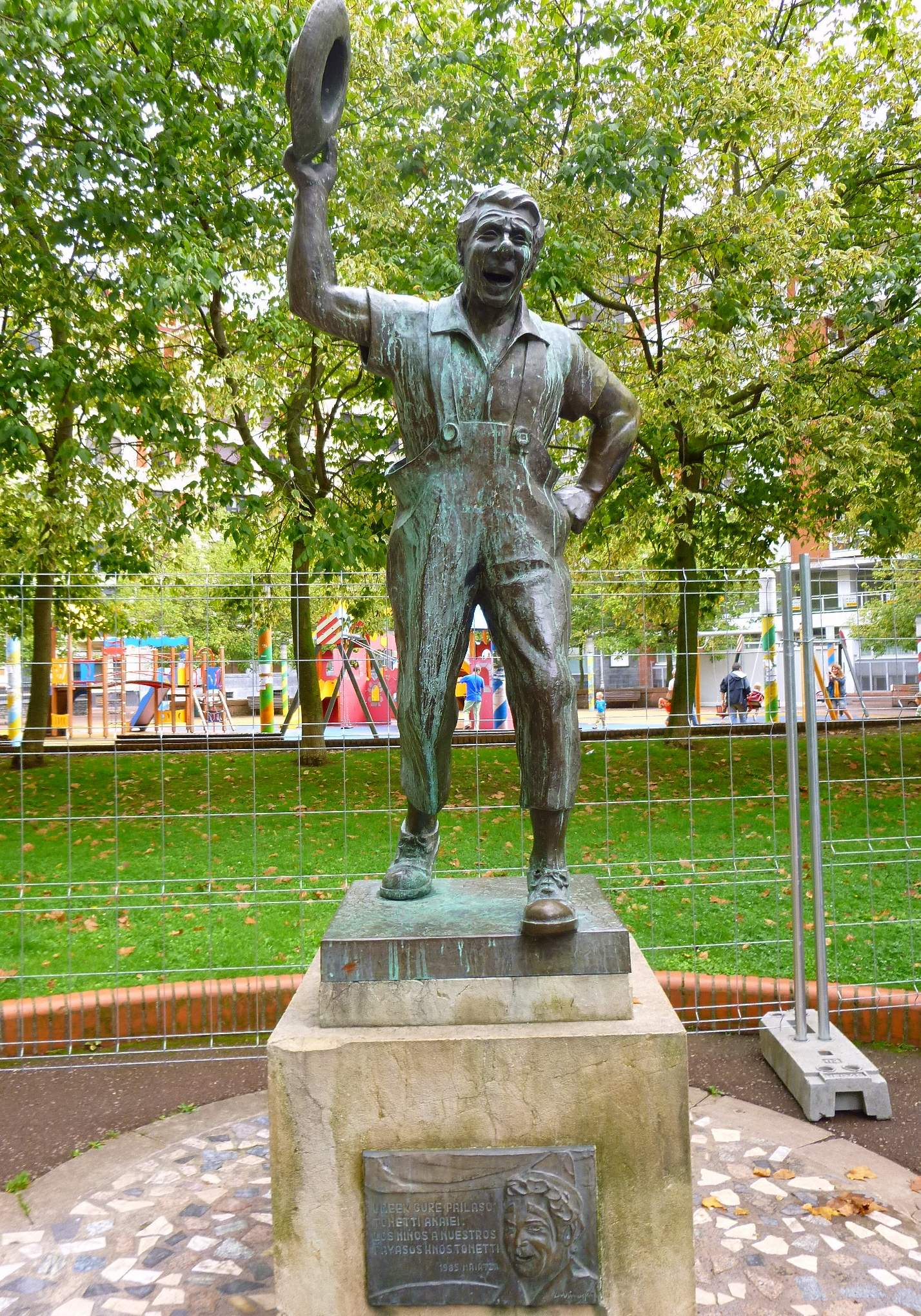 Parque de Doña Casilda Iturrízar (Bilbao). Monumento a los payasos Hermanos Tonetti